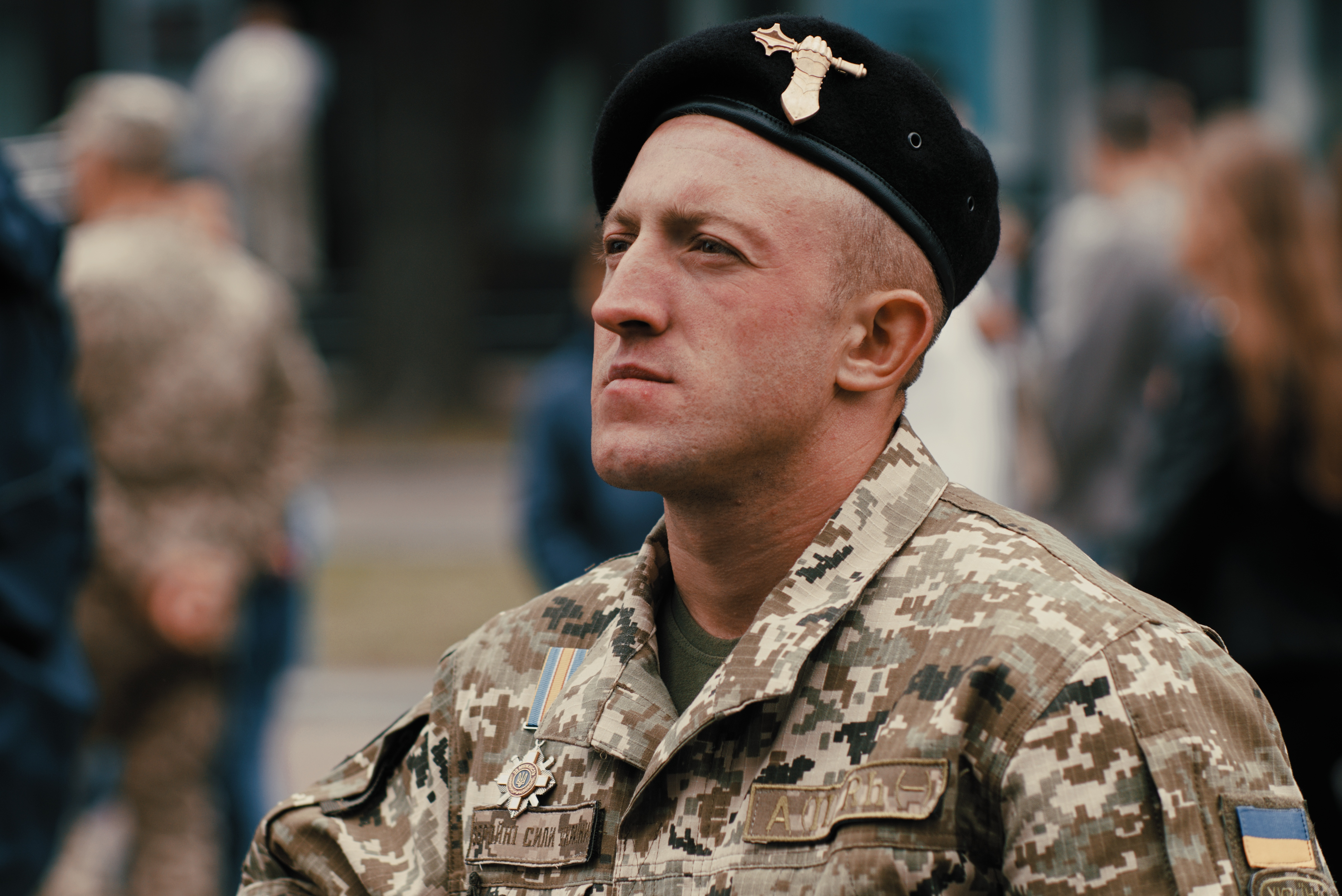 Танкист